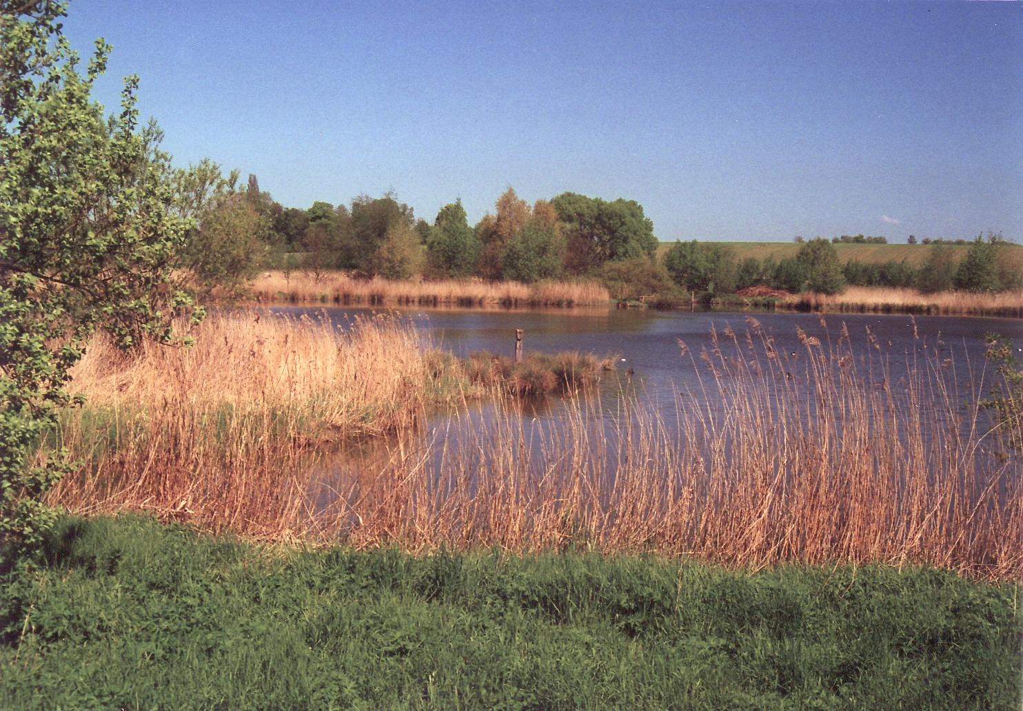 Opfermoor bei Niederdorla mit stilisierter Göttergestalt am Rand des Sees. Blick von Süden.